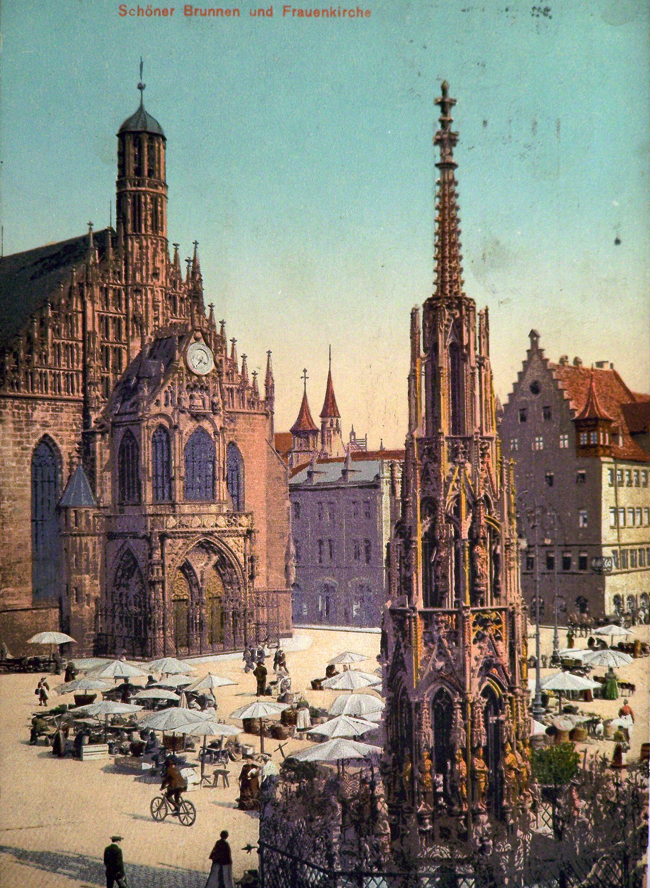 Postkarte Nürnberg, Schöner Brunnen und Frauenkirche, Poststempel vom 22.12.1913